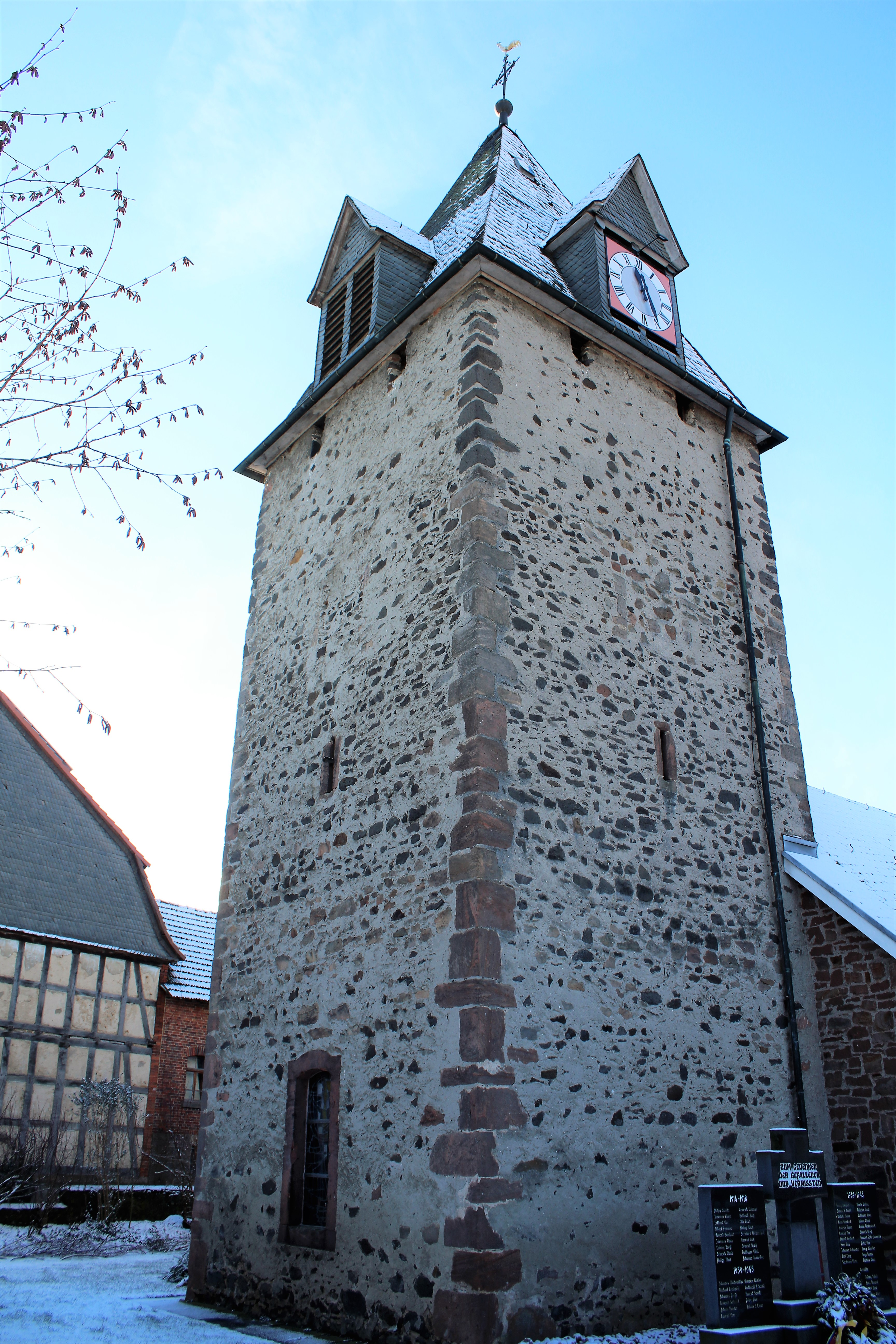 Evangelische Kirche Leidenhofen, Gemeinde Ebsdorfergrund, Landkreis Marburg-Biedenkopf, Hessen, Deutschland